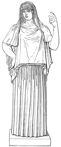 Vesta Giustiniani oder Giustinianische Vesta (Hestia) im Museo Torlonia in Rom, eine weibliche Gewandstatue strengen Stils.